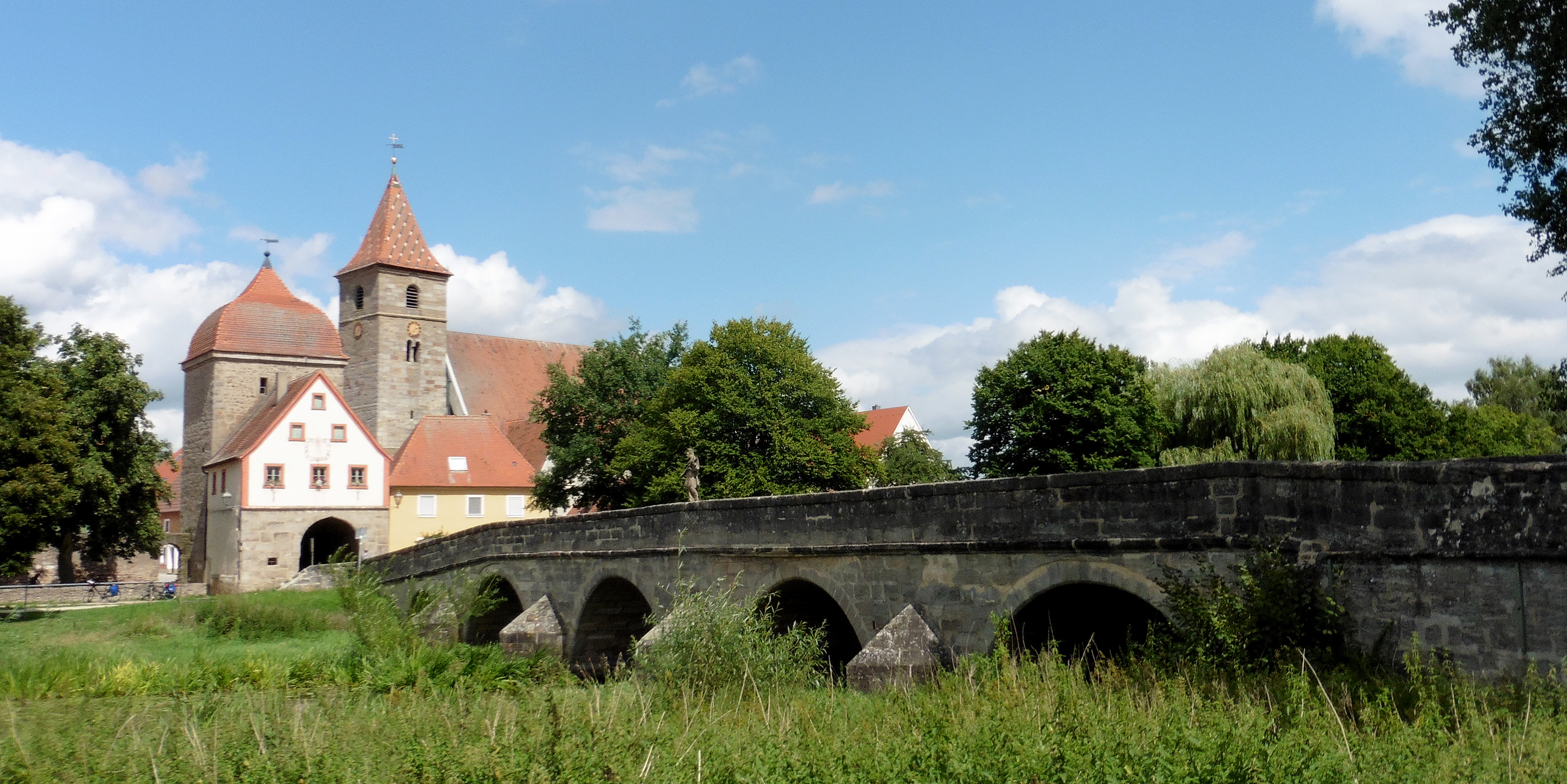 Historische Altmühlbrücke mit Stadttor (Unteres Tor) und Kirche in Ornbau im Landkreis Ansbach. Ansicht von Südwesten. This is a photograph of an architectural monument.